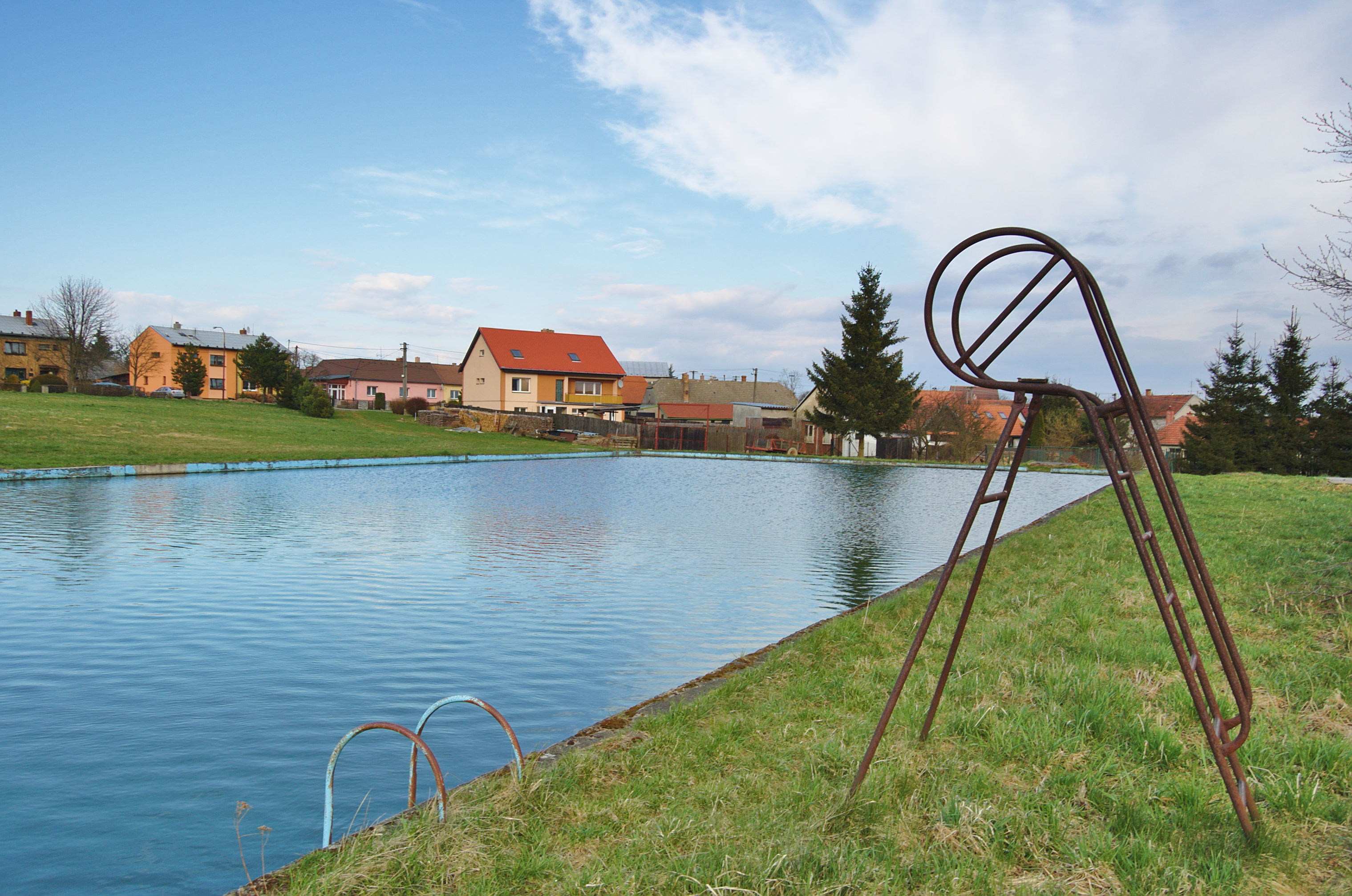 Koupaliště, Buková, okres Prostějov